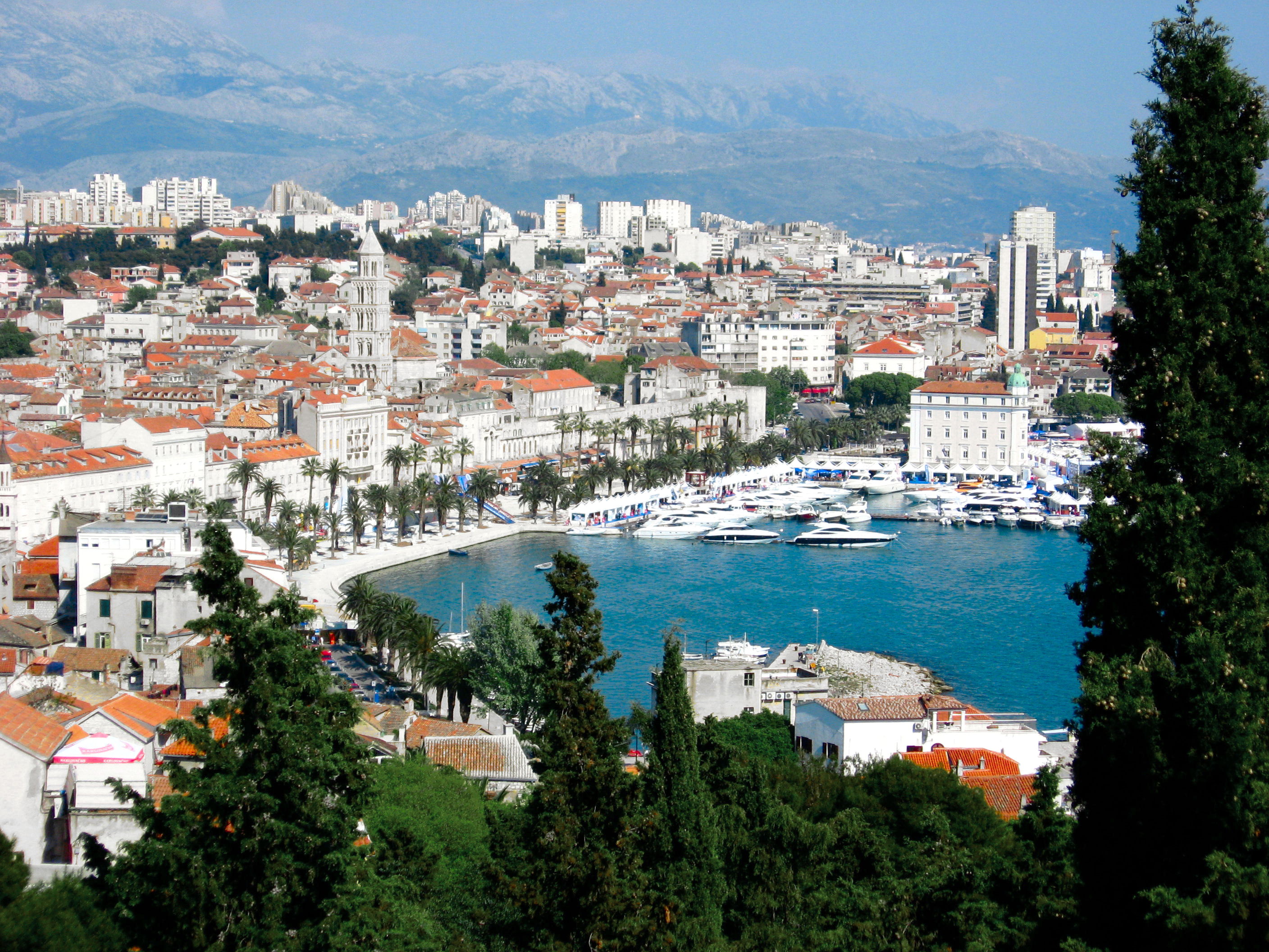 Split - pogled na rivu